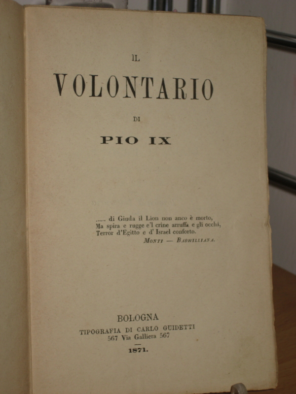 Il volontario di Pio IX, Tipografia Carlo Guidetti, 1871. Archivio personale